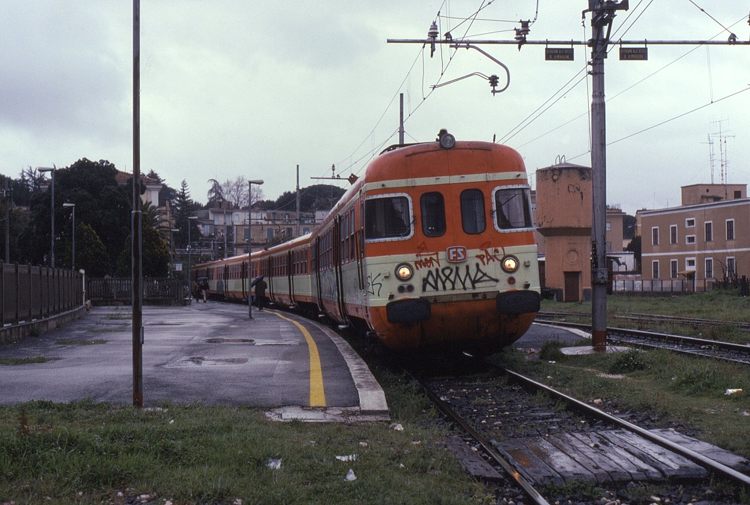 Elettrotreno di automotrici ALe 801 e ALe 940 delle Ferrovie dello Stato in sosta ad Albano Laziale